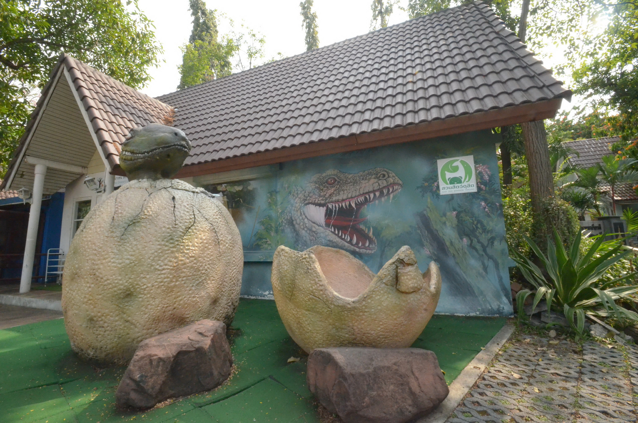 รูปปั้นไข่ไดโนเสาร์ที่สวนสัตว์ดุสิต